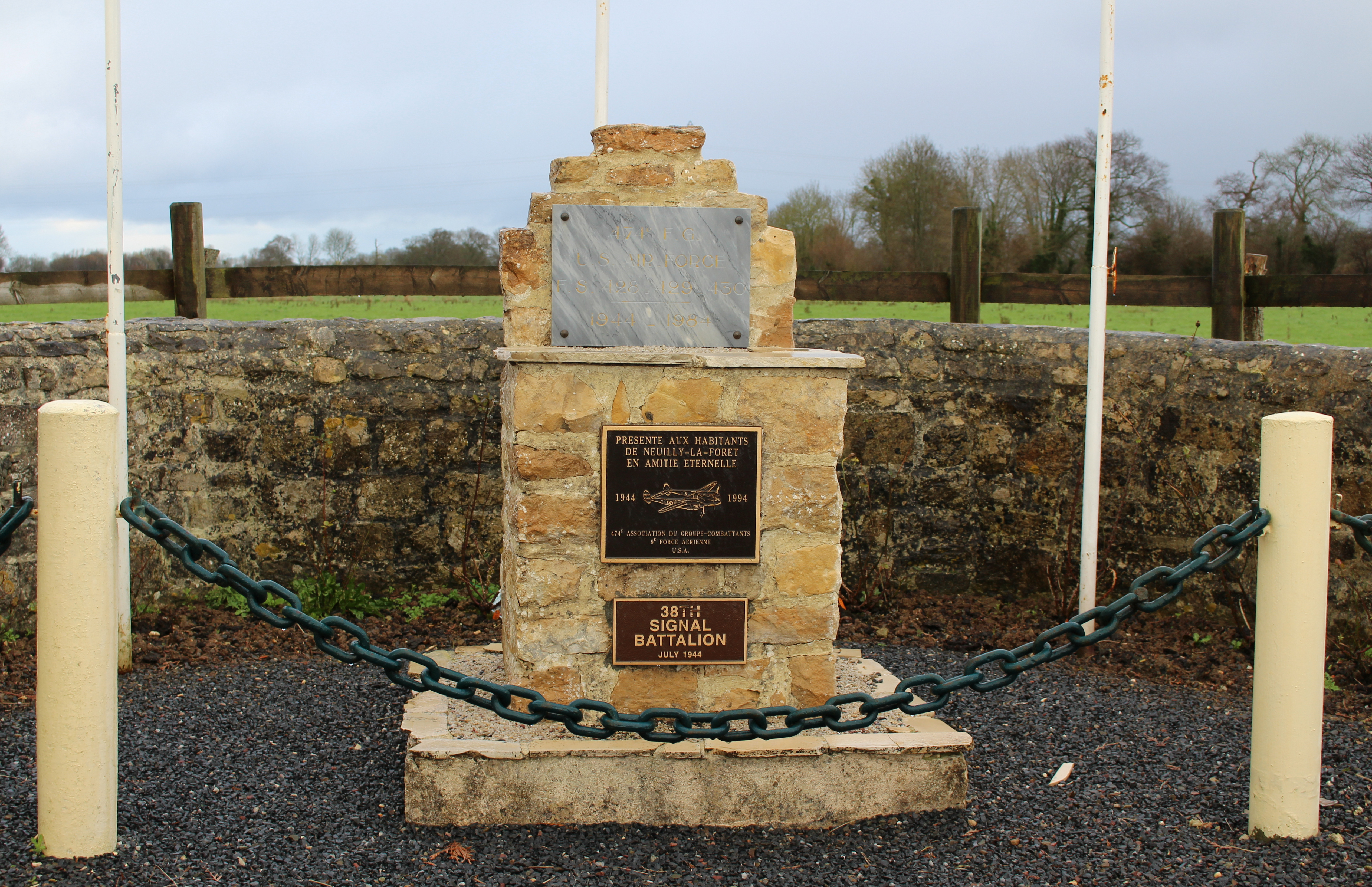 Neuilly-la-Forêt, Calvados